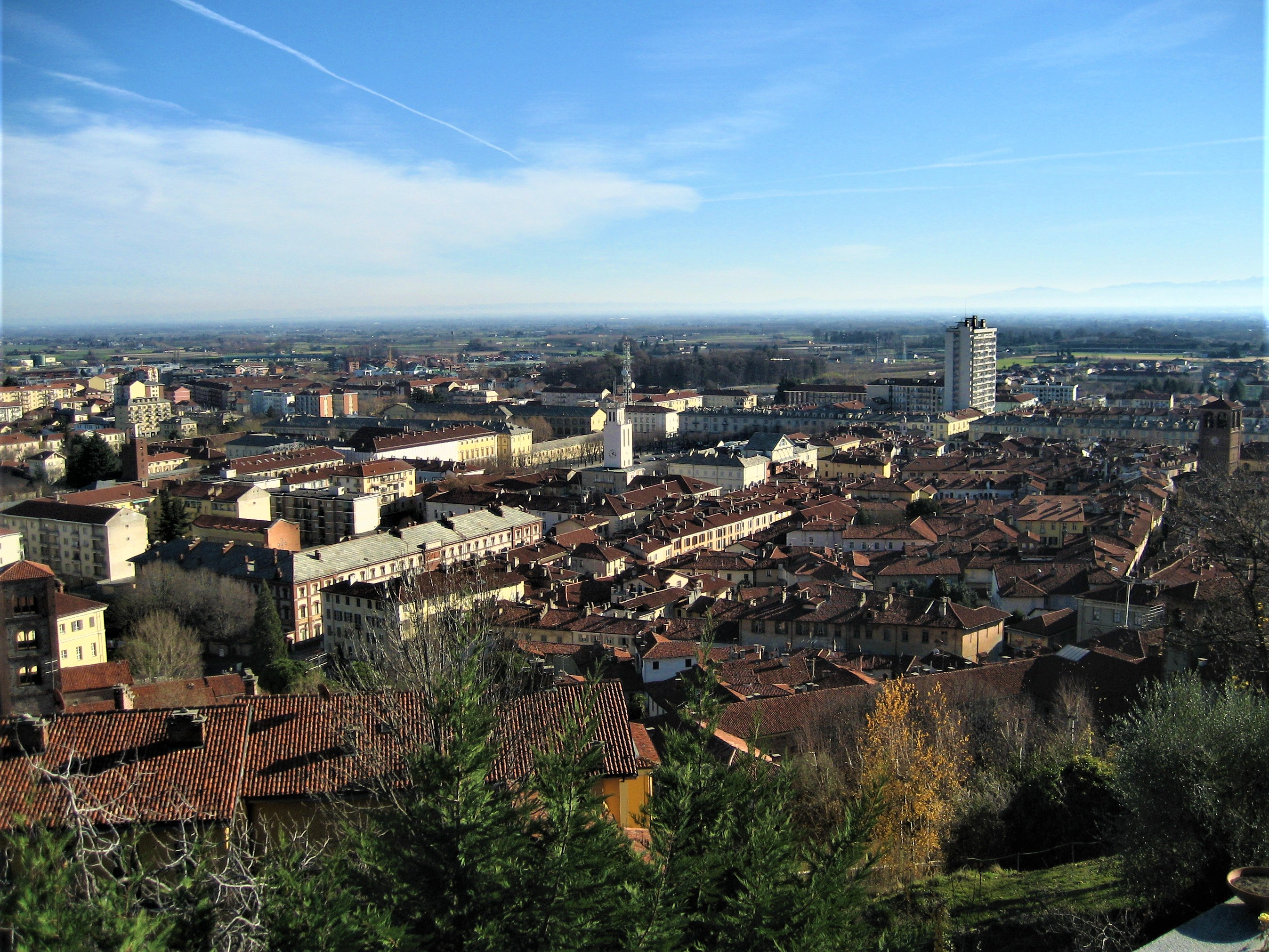 Stadt Pinerolo